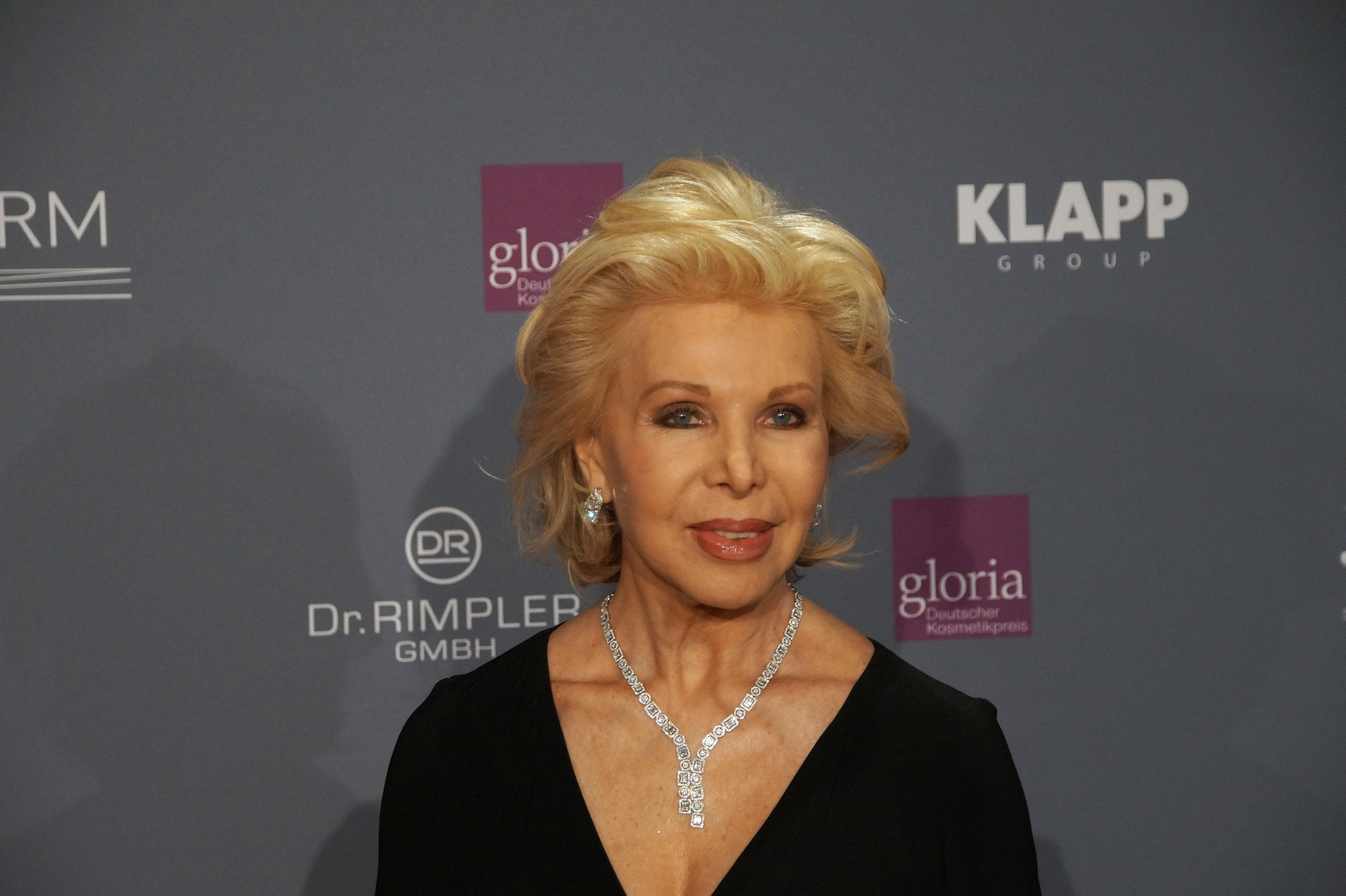 Ute Ohoven beim "Gloria – Deutscher Kosmetikpreis" am 04. März 2016 im Hilton Hotel Düsseldorf.